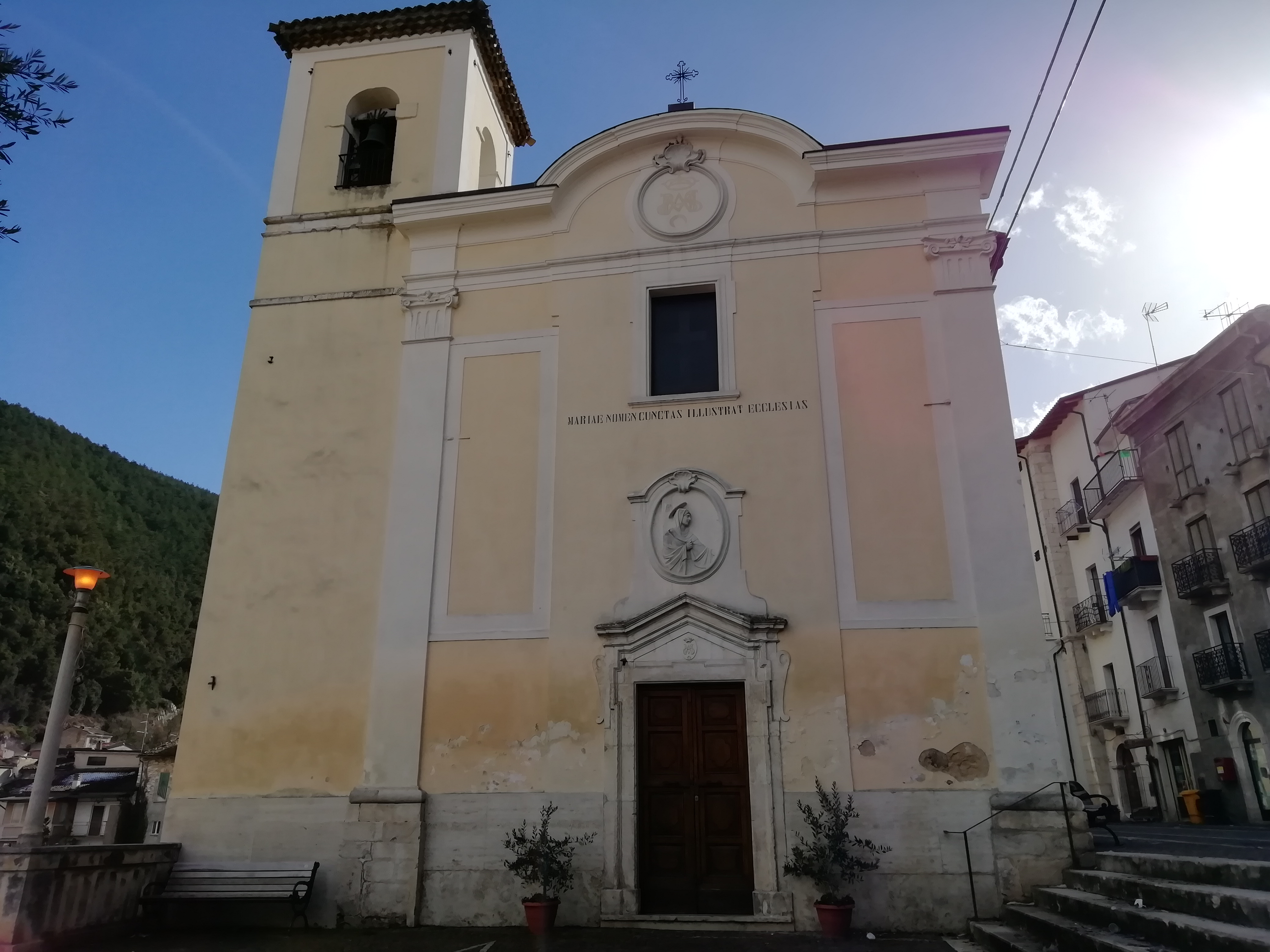 Riguardo questa chiesa non si sa precisamente la data dell'edificazione, si suppone intorno al 1500.